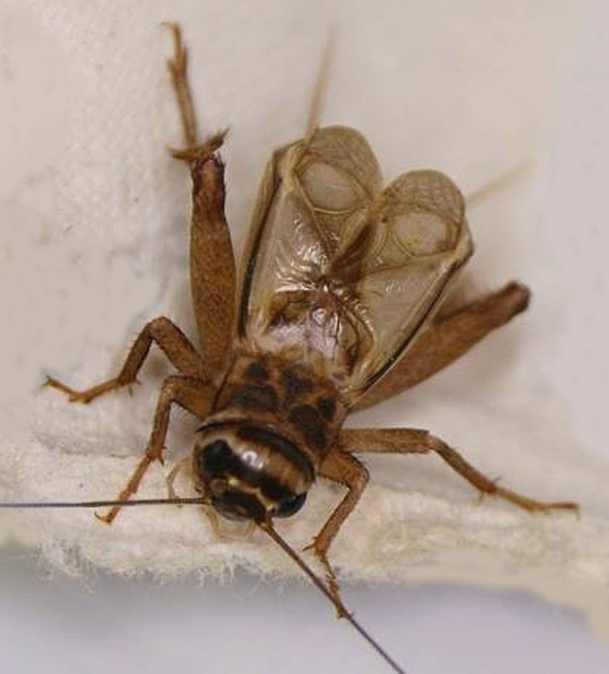 Achtea domesticus, zirpendes Männchen